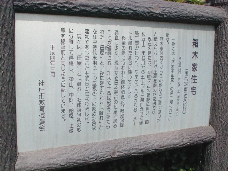 箱木千年家看板